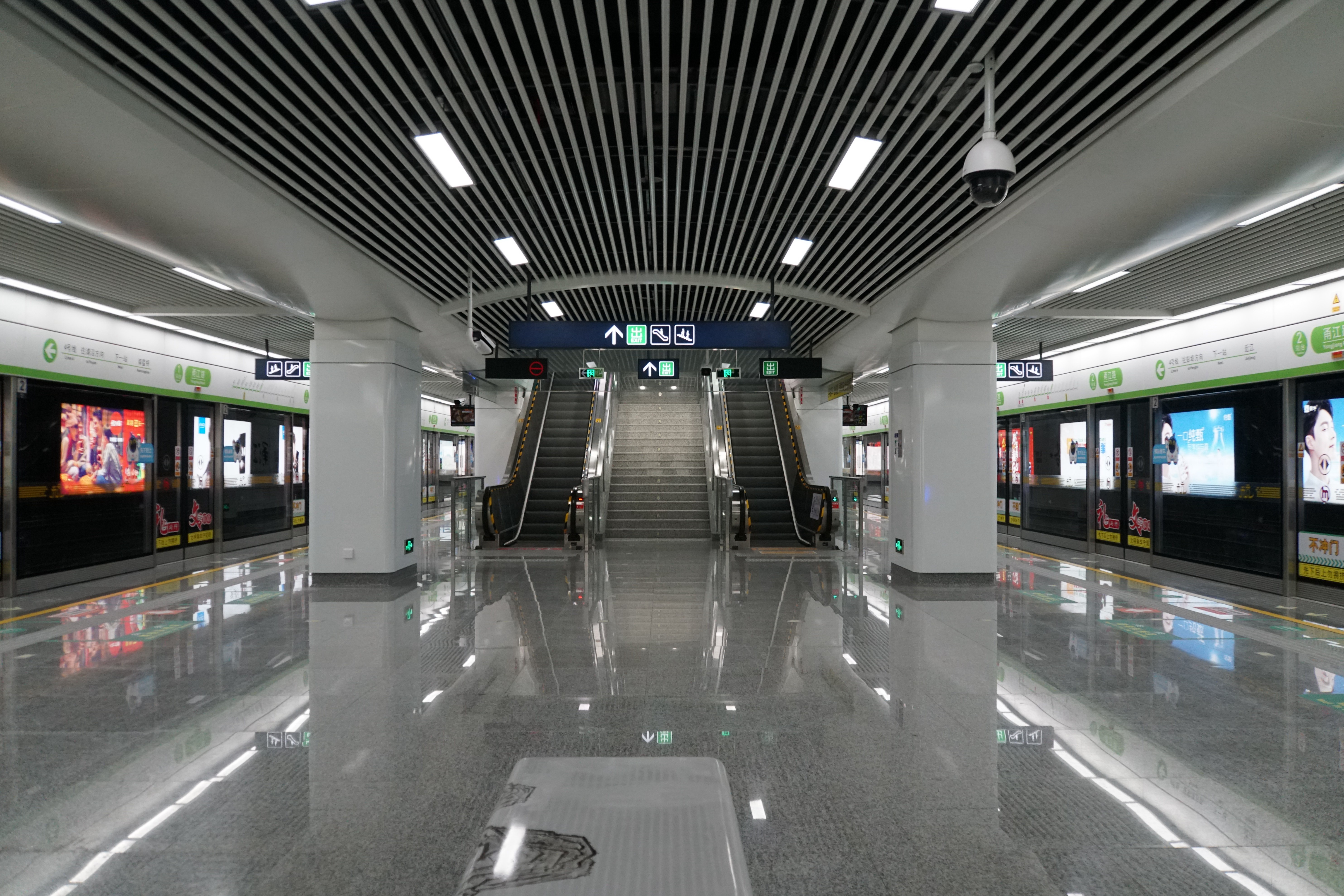 甬江路站站台